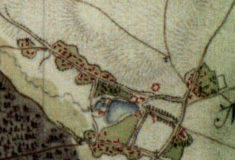 Mapa Mnichowa wykonana przez von Heldensfelda na pocz. XIX wieku.